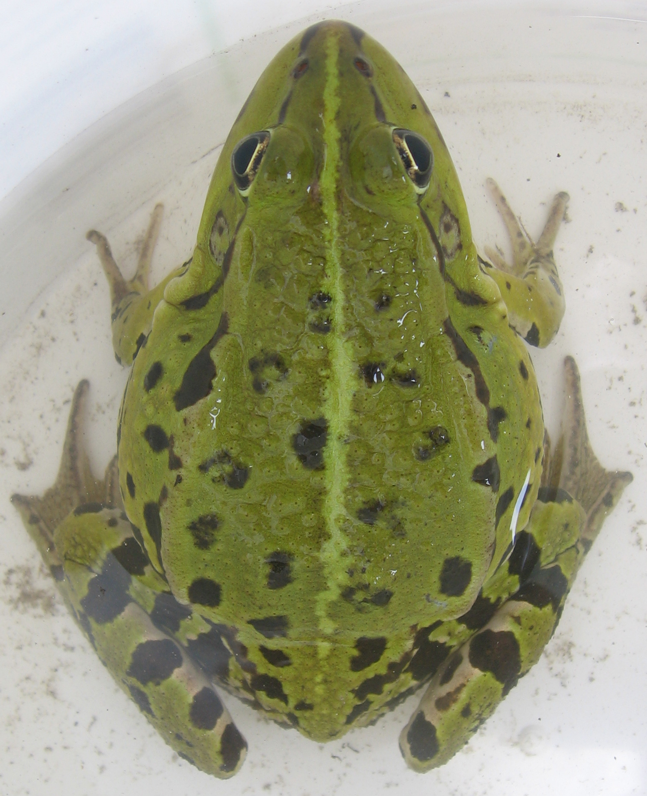 któraś z żab zielonych, w małopolsce, w otoczeniu domu (znaleziona w oczku wodnym)